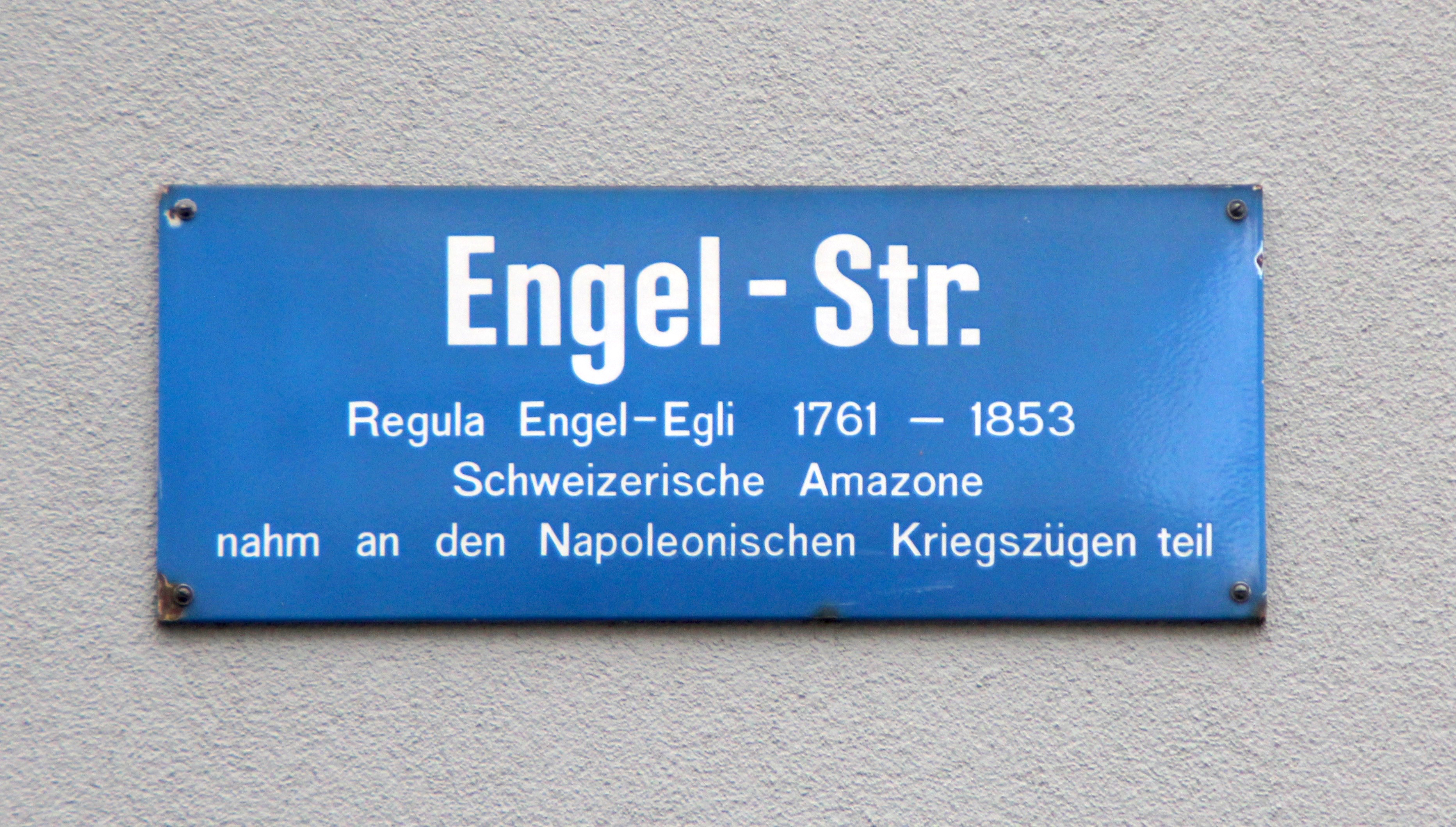 Strassenschild in Zürich als Erinnerung an Regula Engel-Egli